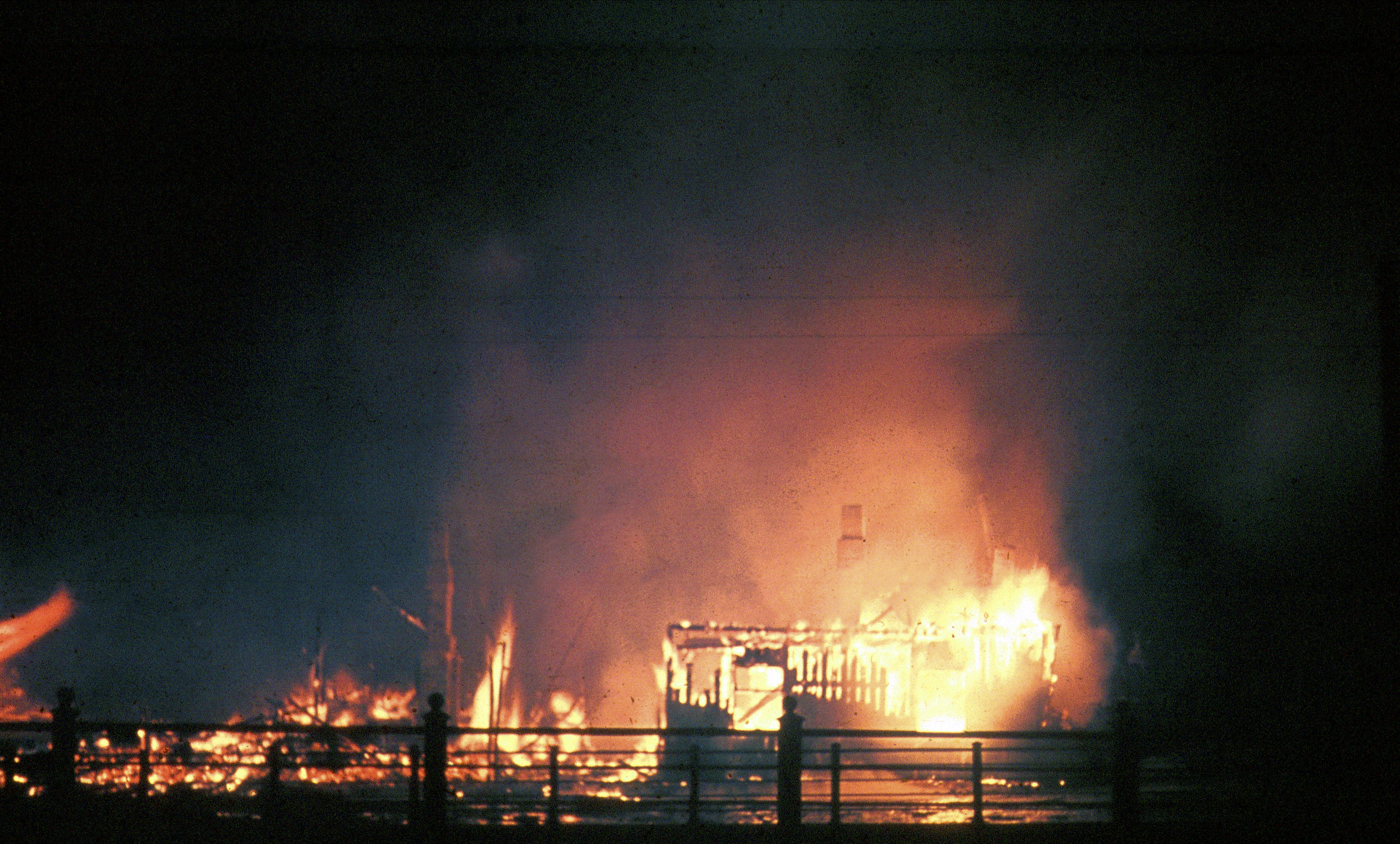 Pommitustuhoja Helsingissä 1944.02.07